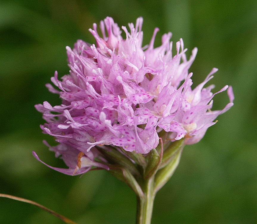 Traunsteinera globosa, Tannheimer Berge, Austria